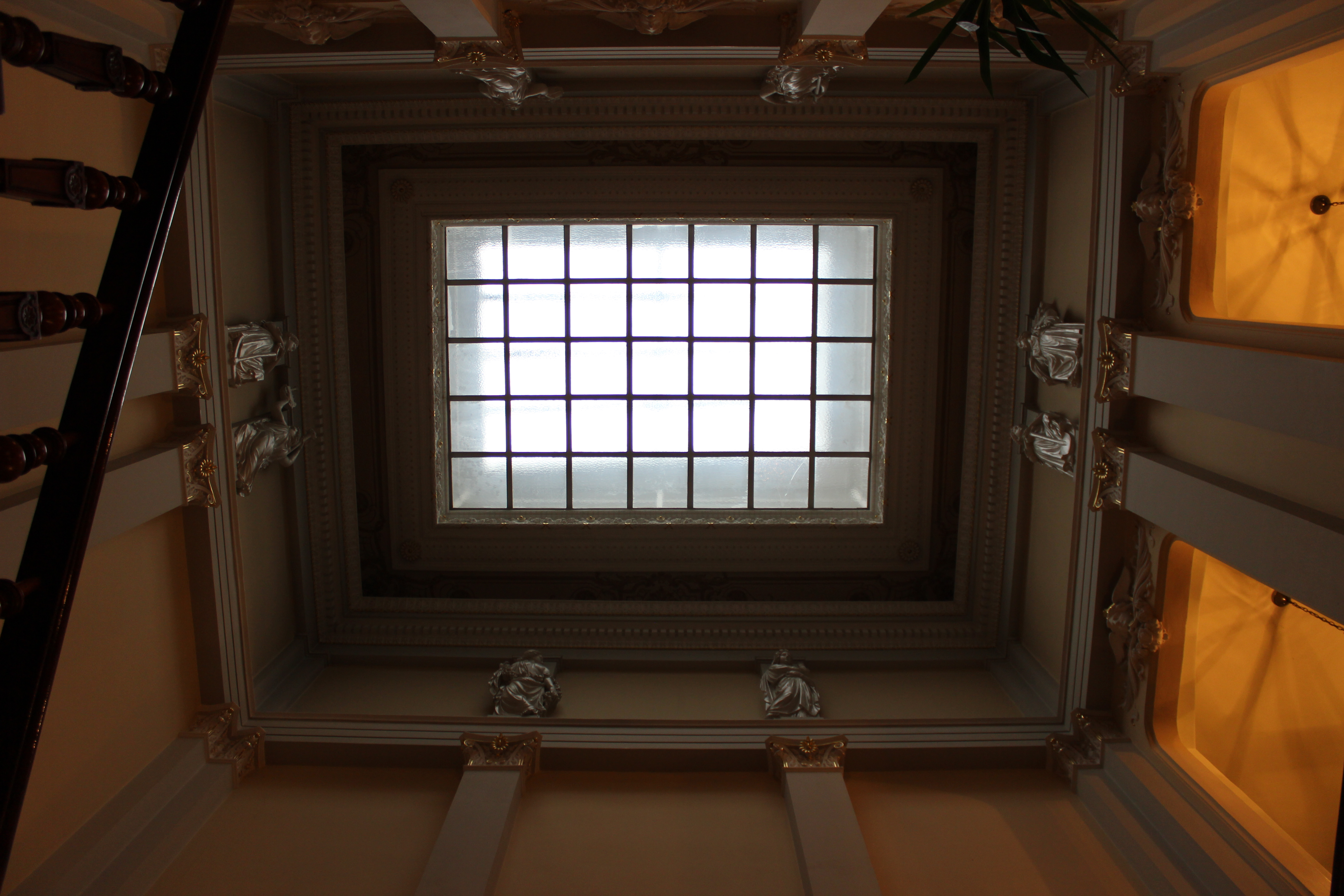 Villa Kogge, Berlin